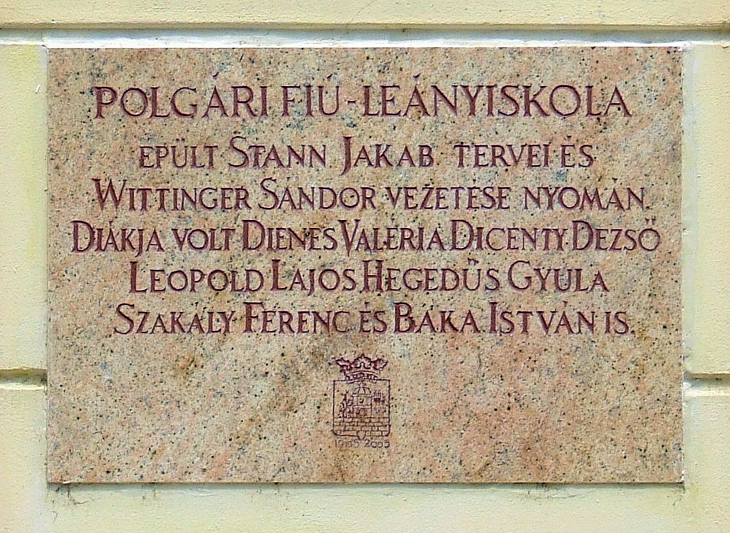 Emléktábla az egykori szekszárdi Polgári Fiú-Leány Iskola épületén